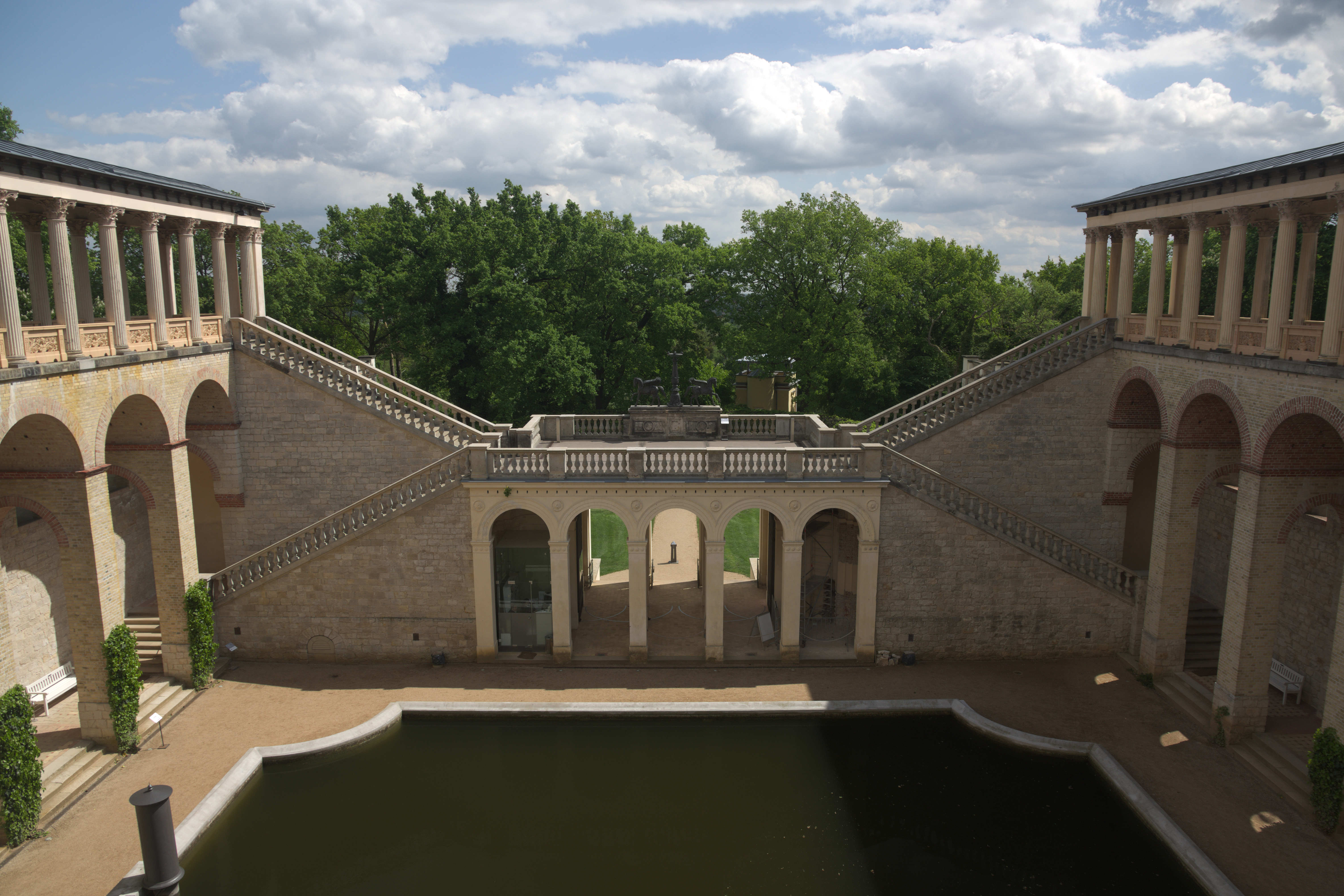 Belvedere auf dem Pfingstberg, Potsdam (2015)